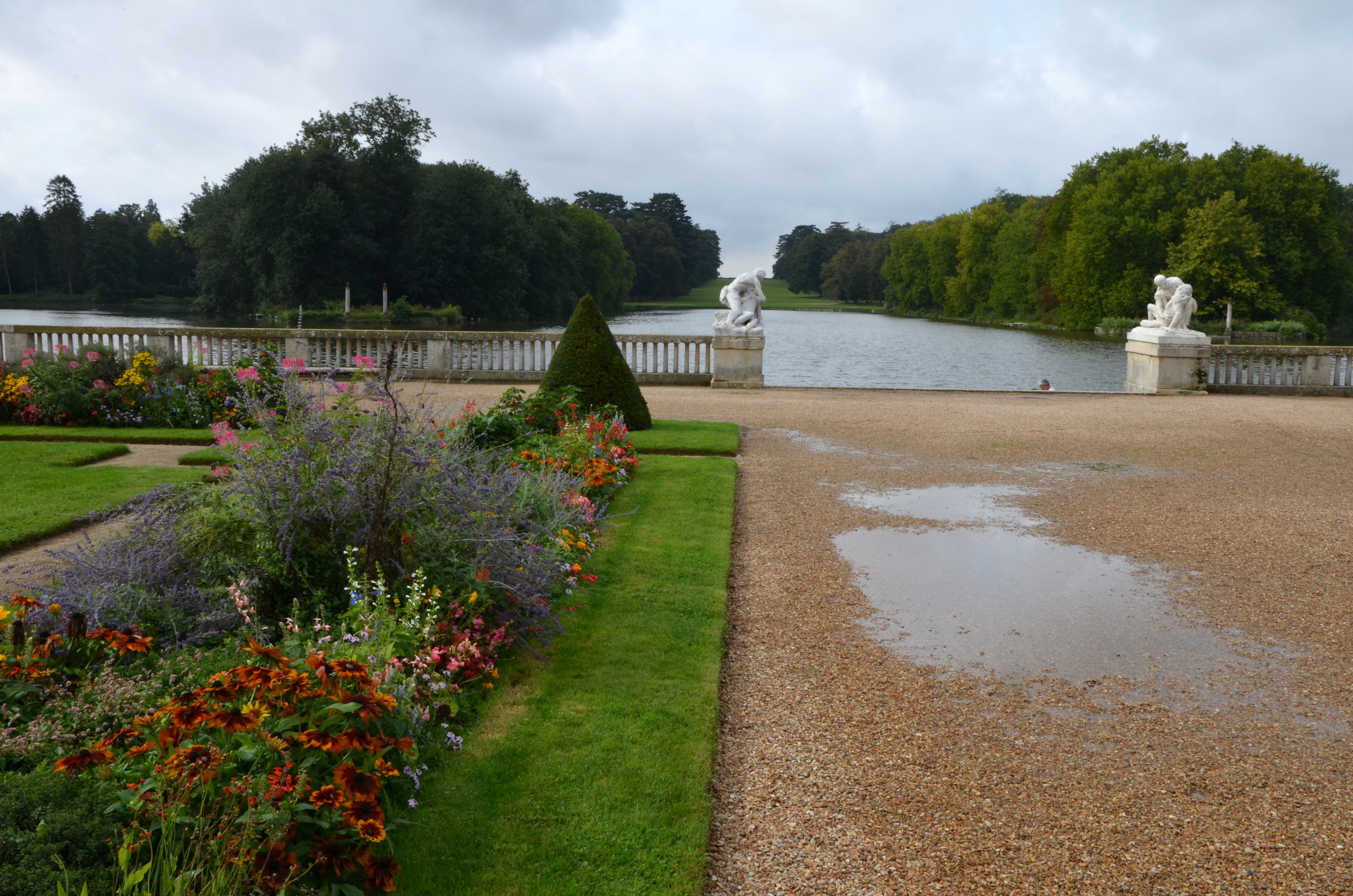 Parc du Chateau de Rambouillet, Yvelines, France